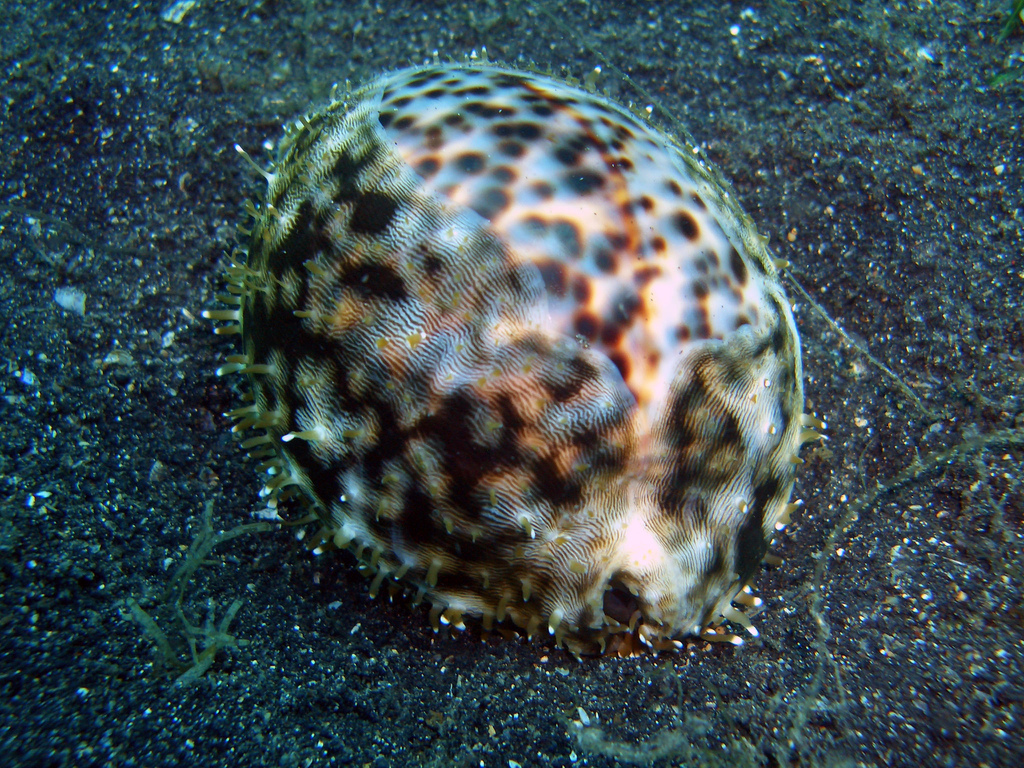 Cypraea tigris